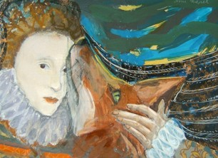 Queen and royal fox, Werk der Künstlerin Irene Niepel